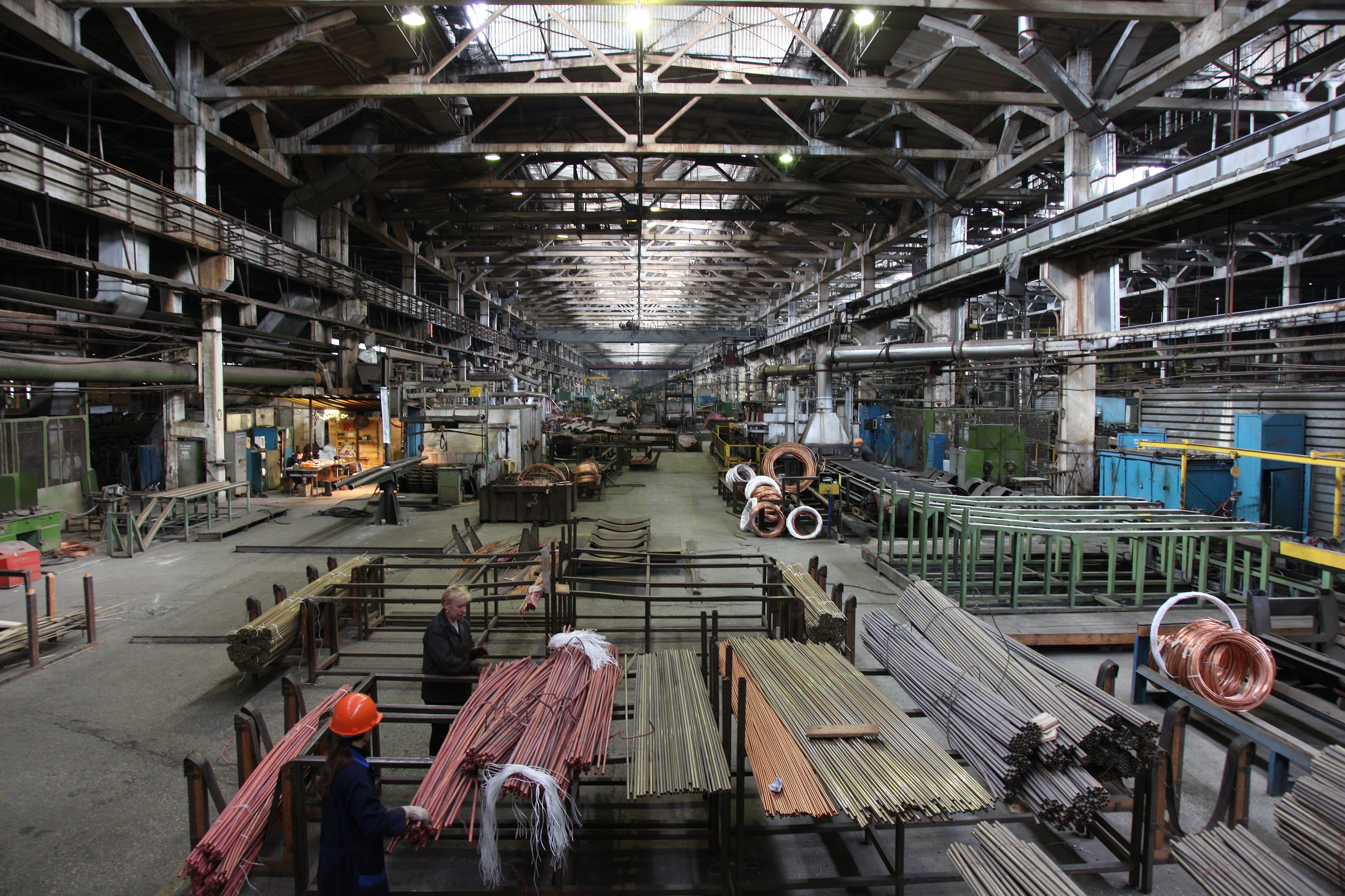 Прессово-волочильный цех РЗОЦМ